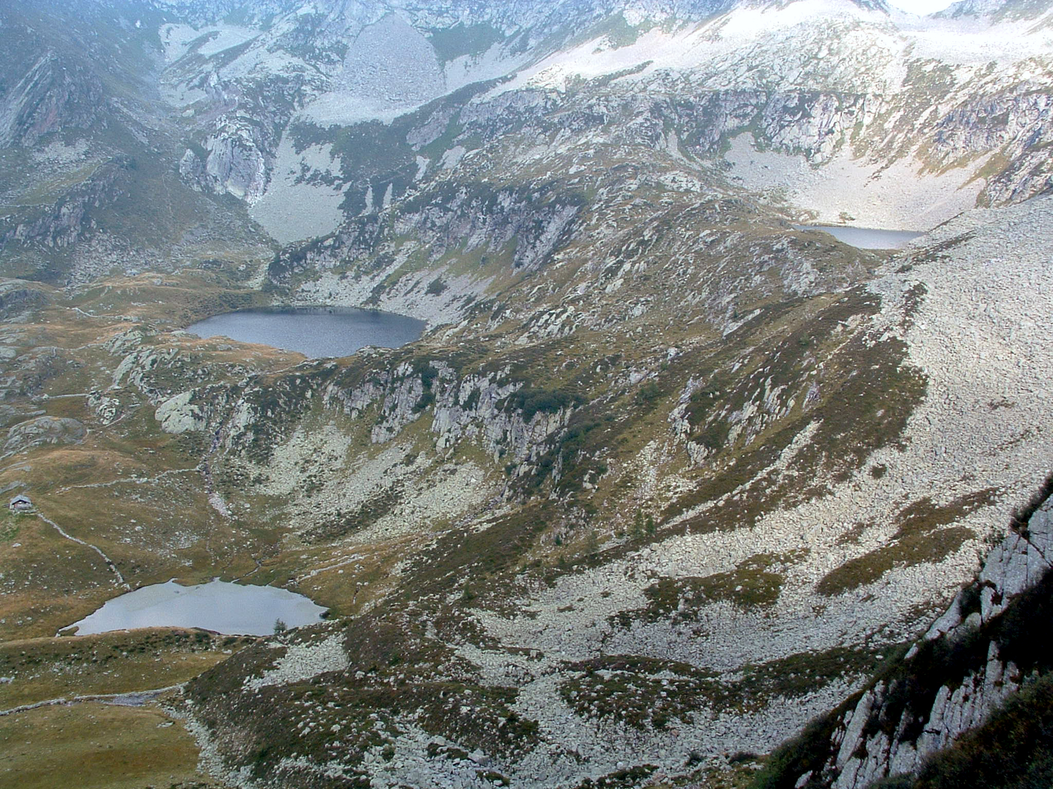 Foto dei Laghi di Porcile, di Orobicon